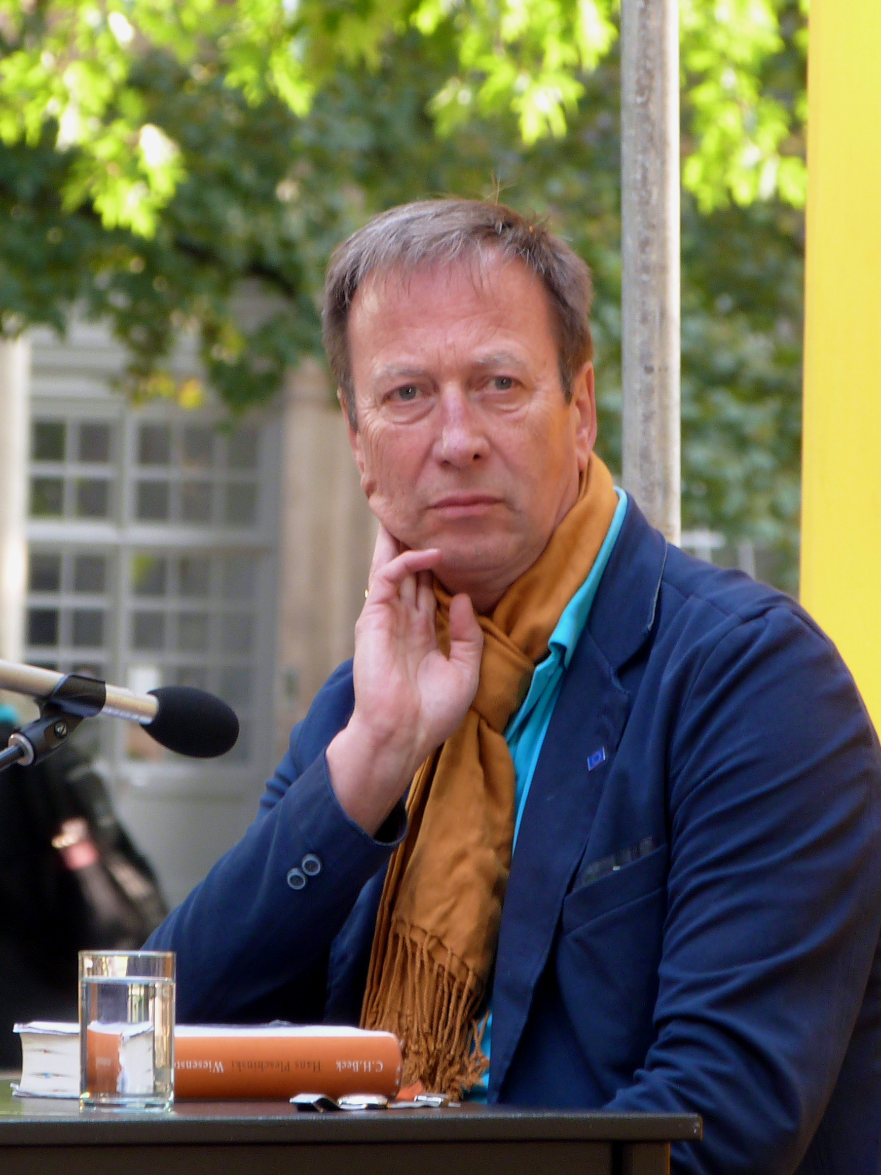 Der Schriftsteller Hans Pleschinski vor einer Lesung auf dem Erlanger Poetenfest 2018.